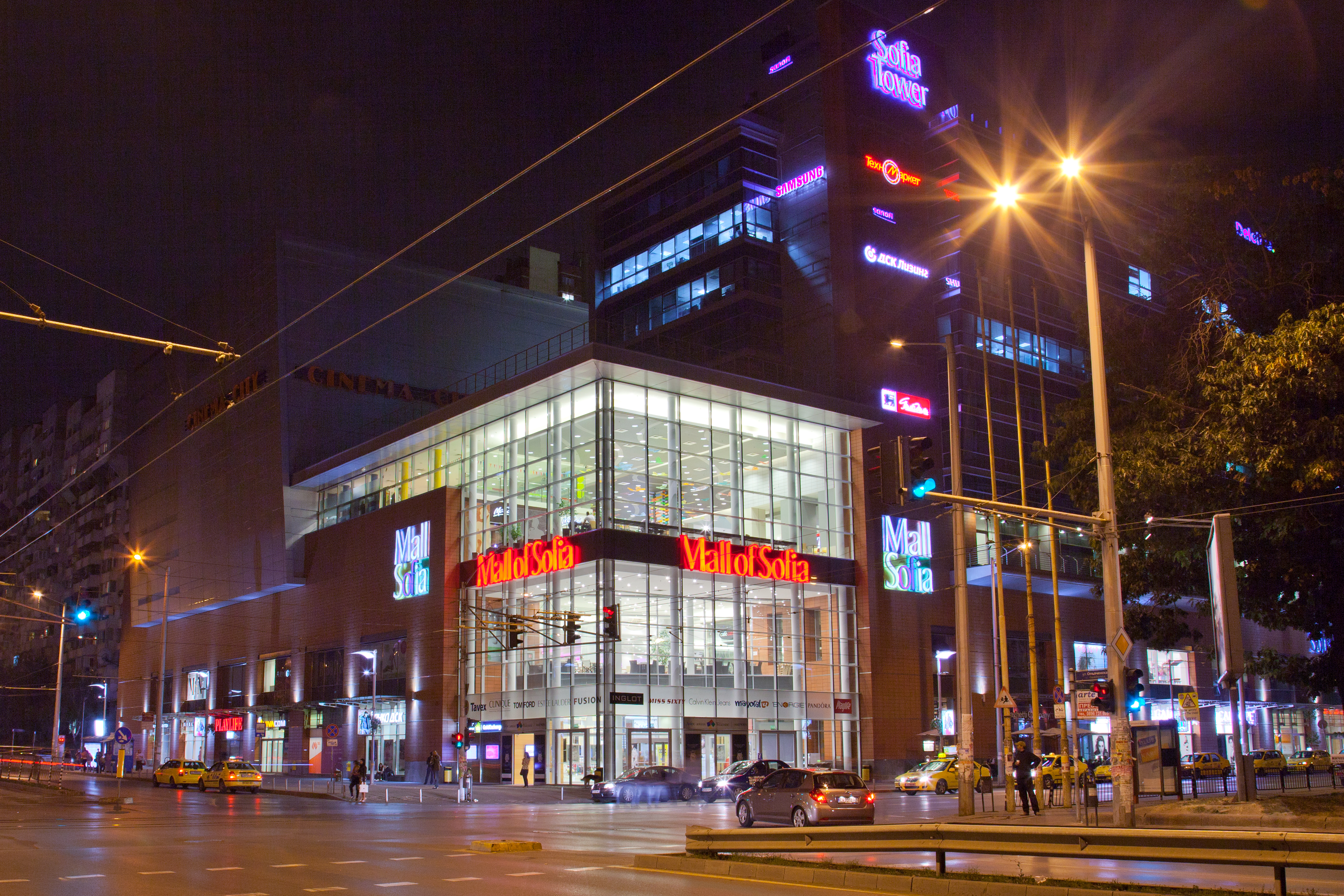 Mall of Sofia; Sofia bei Nacht